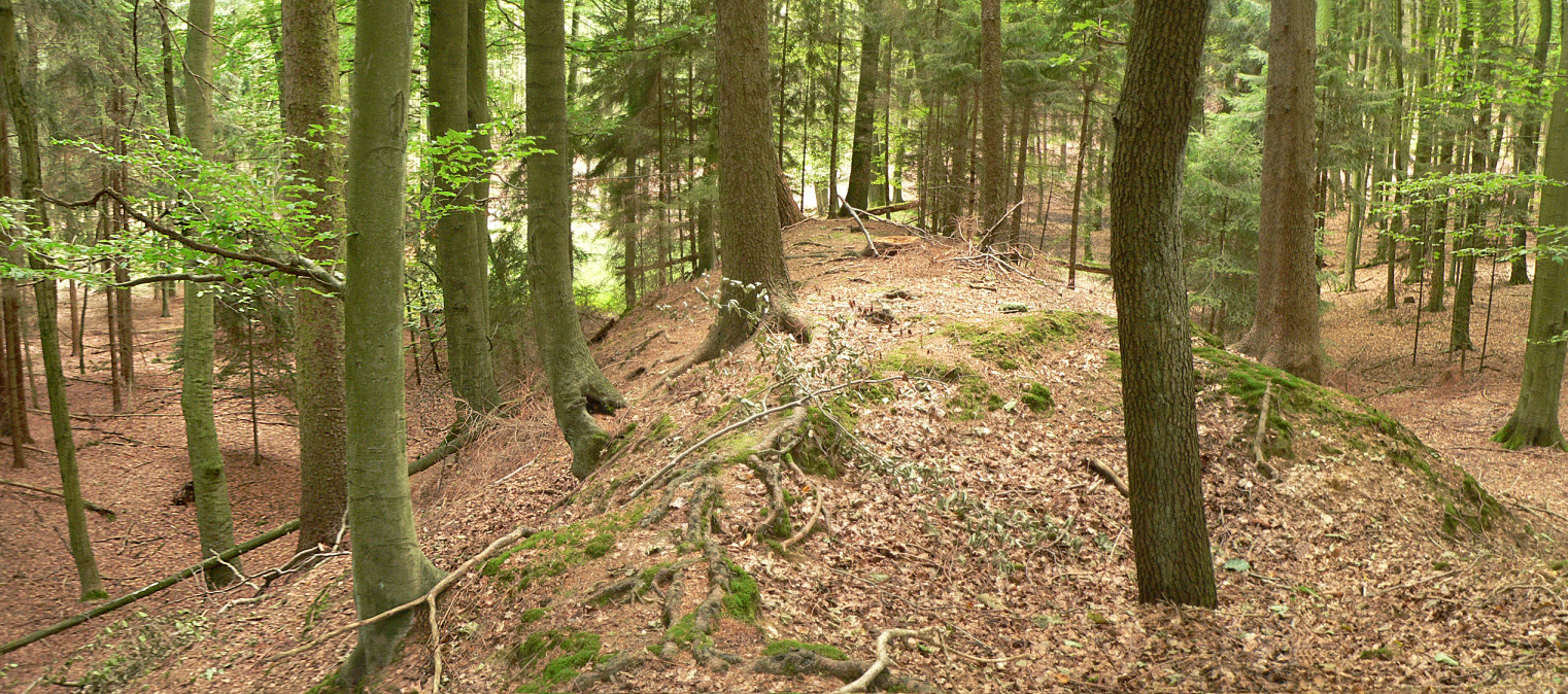 Wall der Bennigser Burg